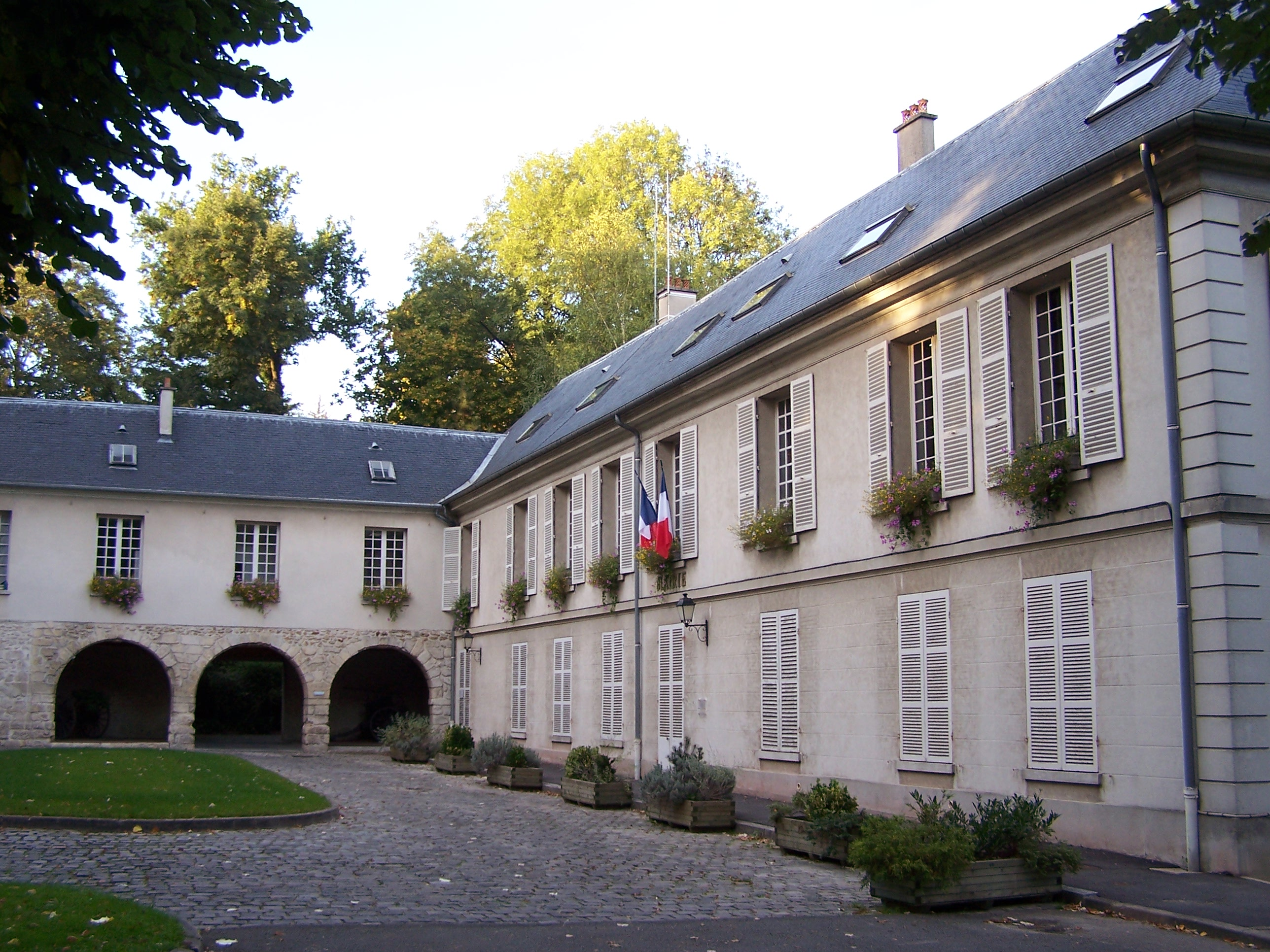 Mairie de L'Étang-la-Ville (Yvelines, France)